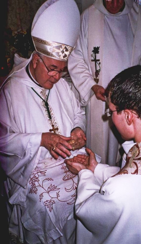 Ordination sacerdotale d'un prêtre (chrismation des mains)